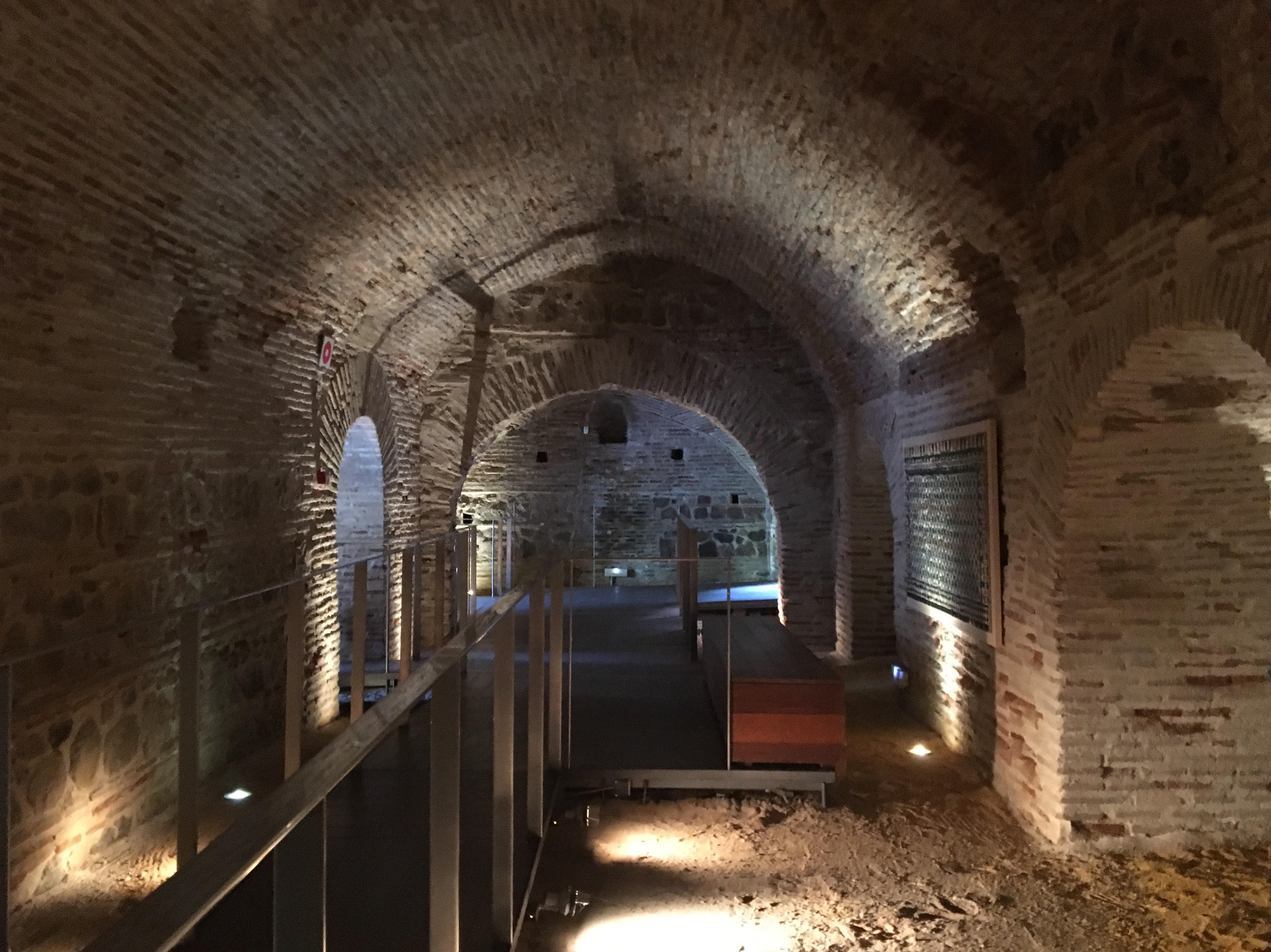 Una cueva debajo del Museo del Greco en Toledo, España